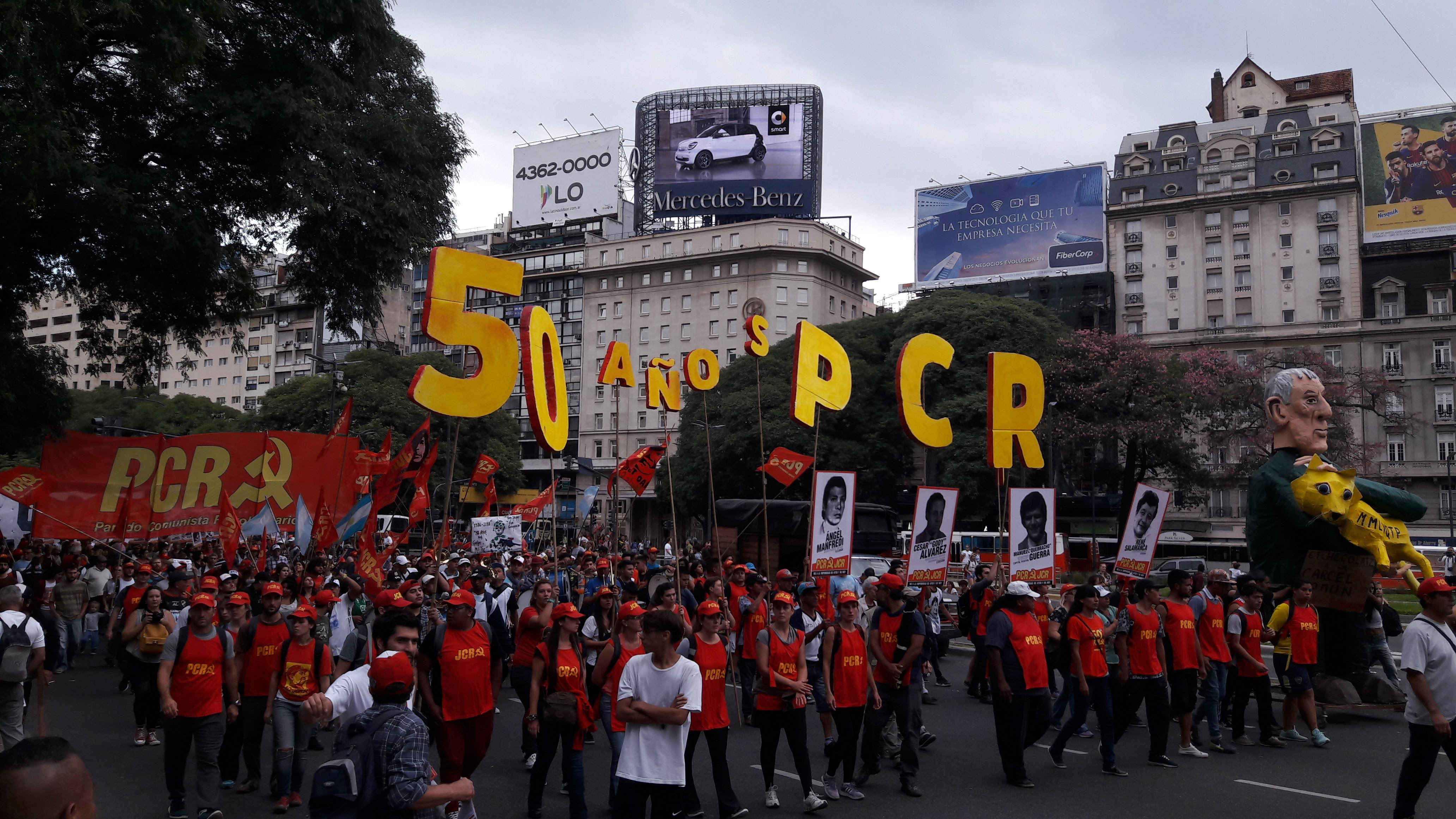 24M Marcha de la Memoria por la Verdad y Justicia en Buenos Aires, Argentina.